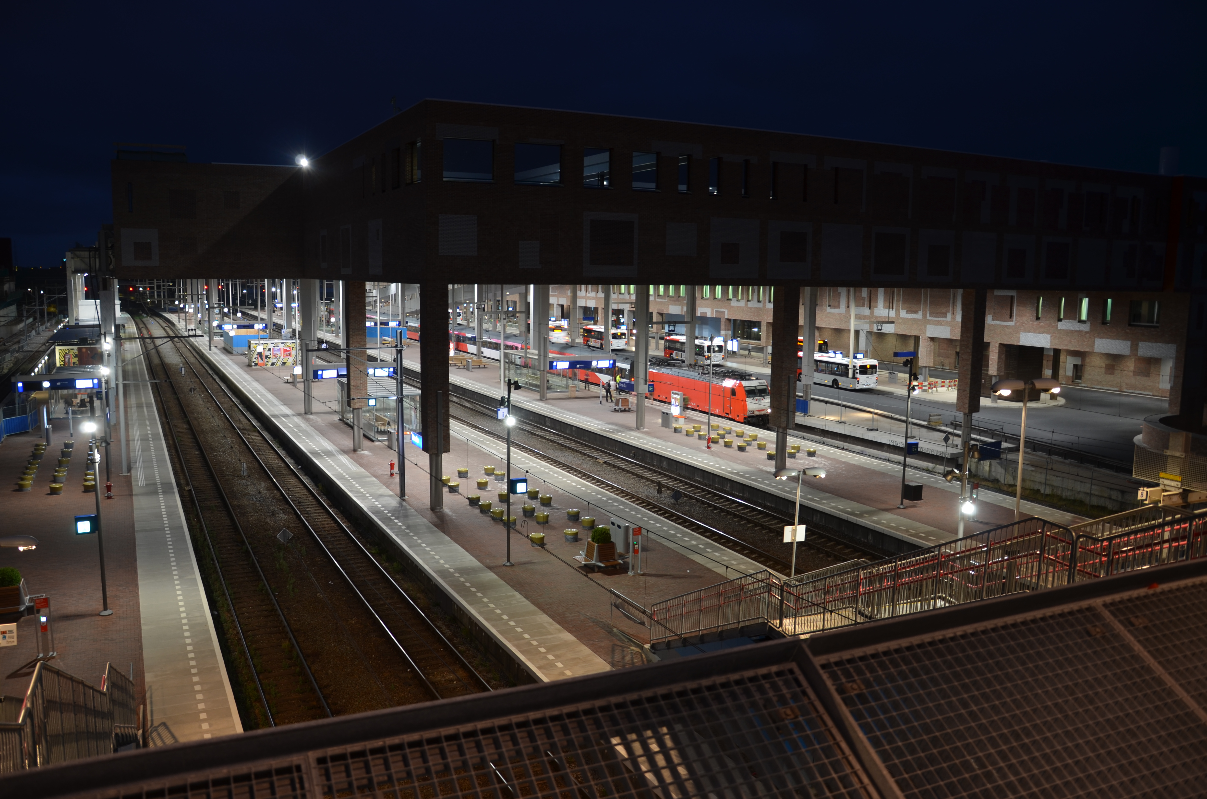 Zicht op een deel van het perron van het Station Breda - 2015